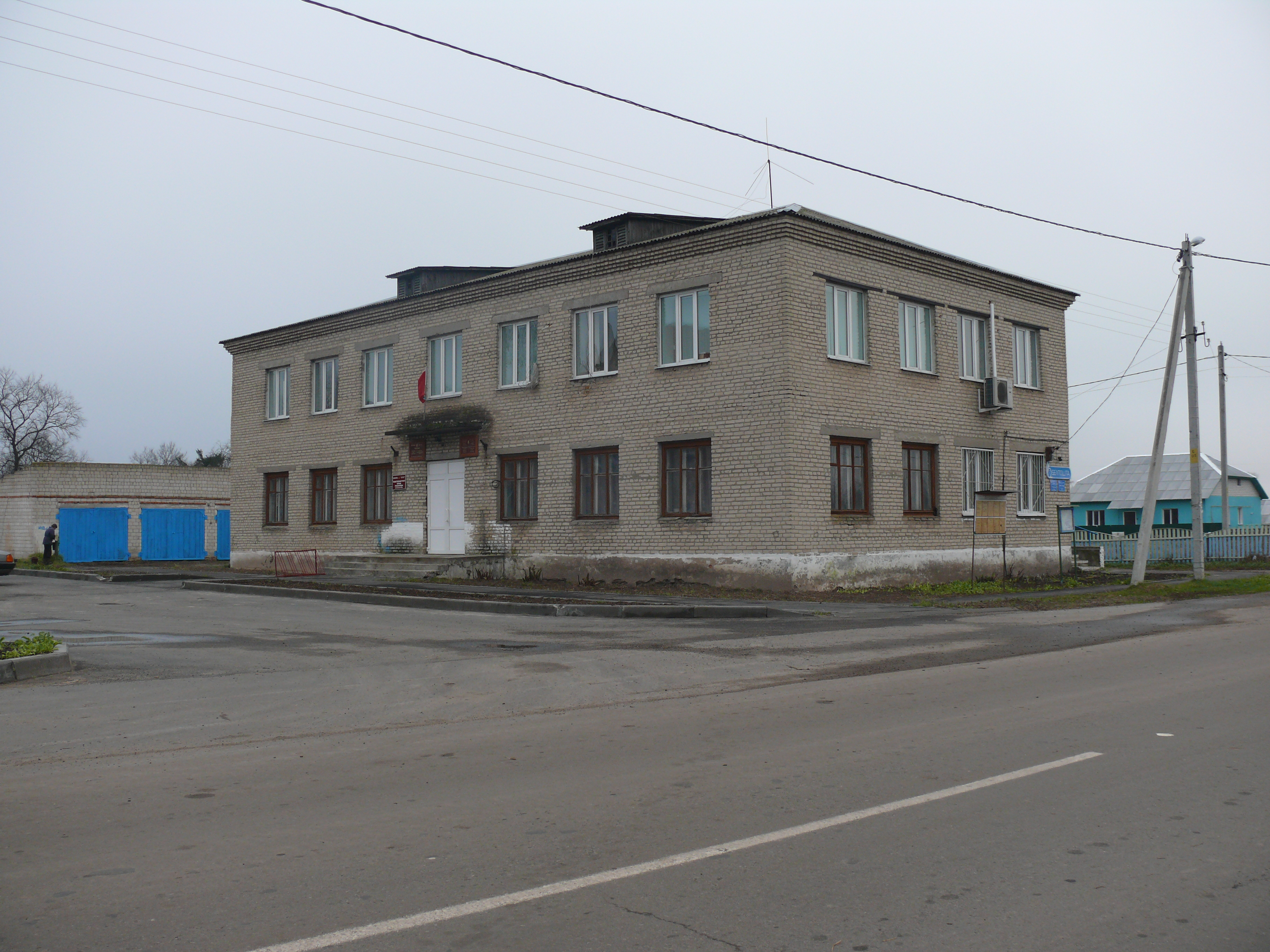 Администрация Чемерисского сельсовета. Брагинский район Гомельской области, Белоруссия